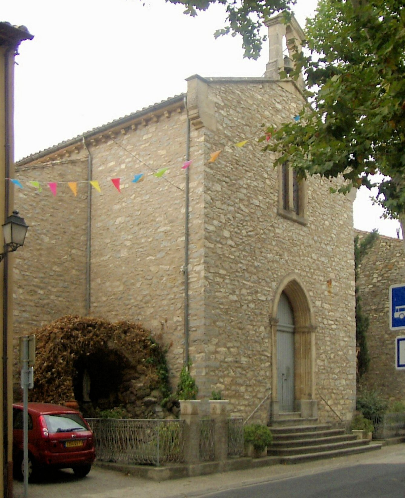 L'église Saint-Saturnin à Villeneuve-les-Corbières